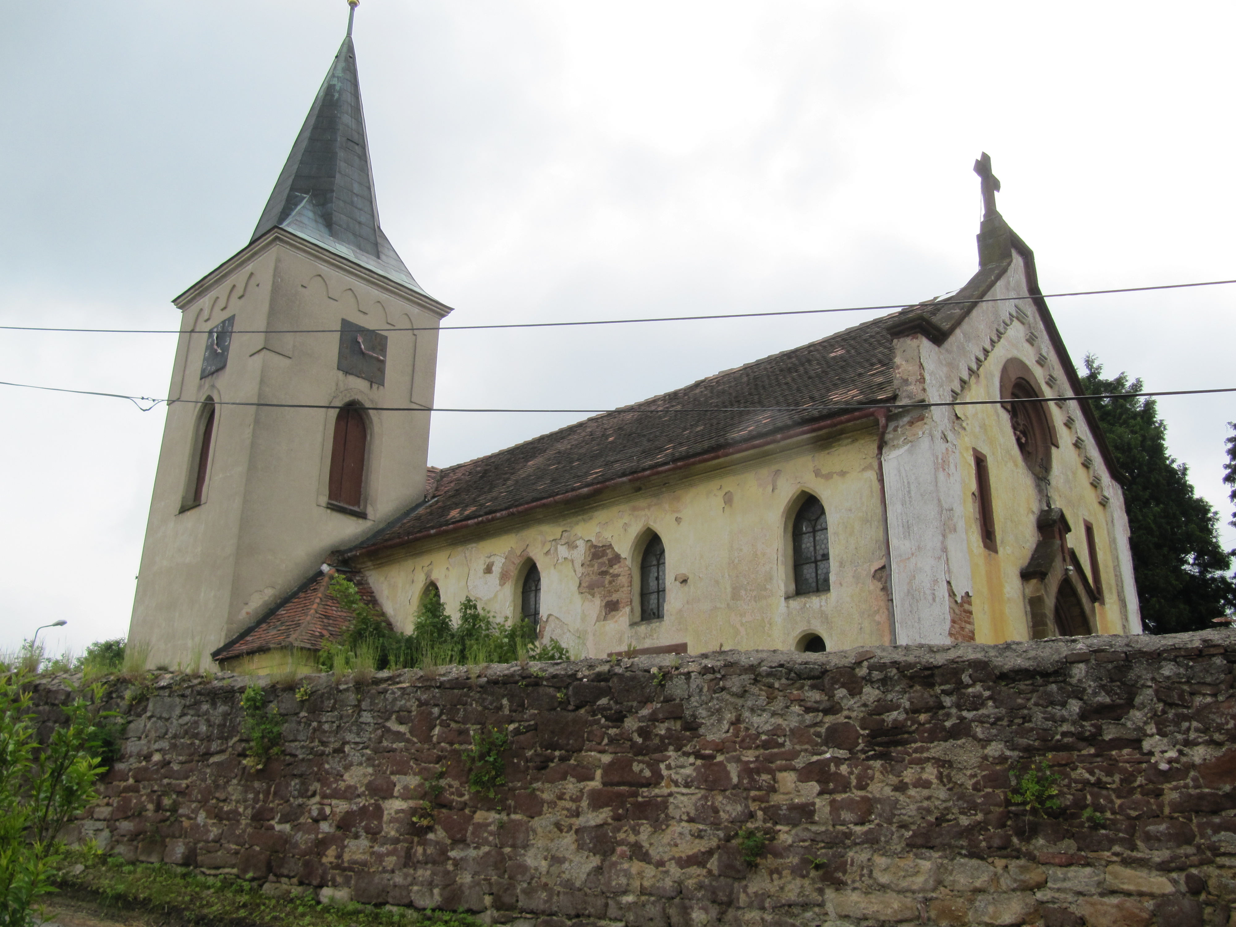 Kostel Všech svatých (Oleška), náves, Oleška